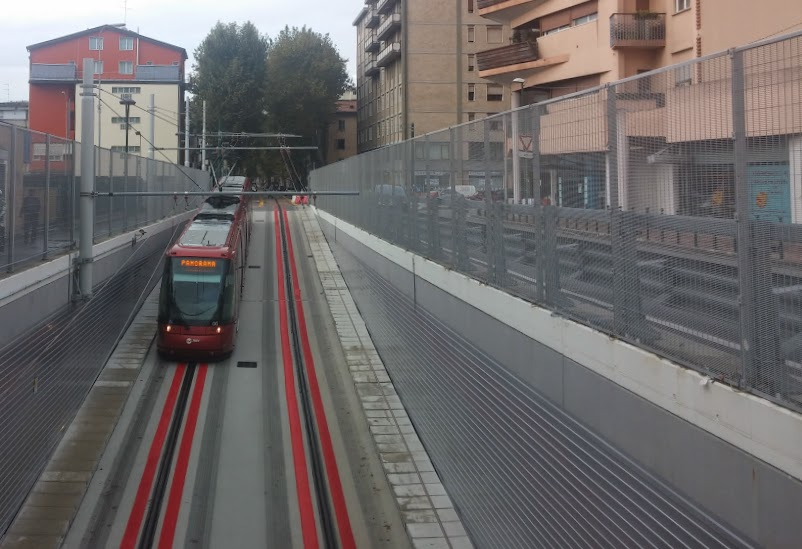 Un convoglio Translohr imbocca il sottopasso della stazione di Mesre in direzione Marghera